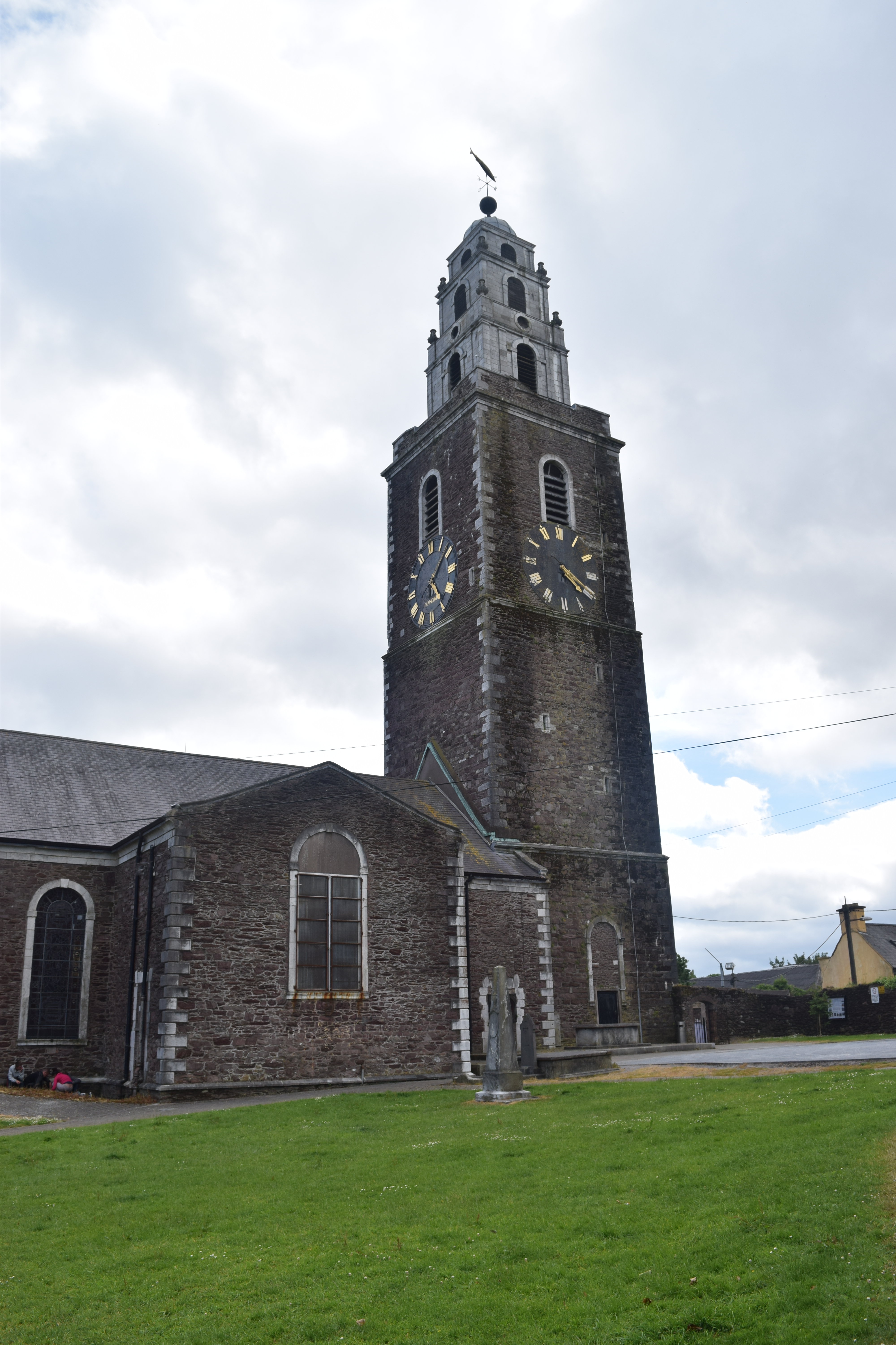 Սբ.Աննայի եկեղեցի, քաղաք Կորկ, Իռլանդիա